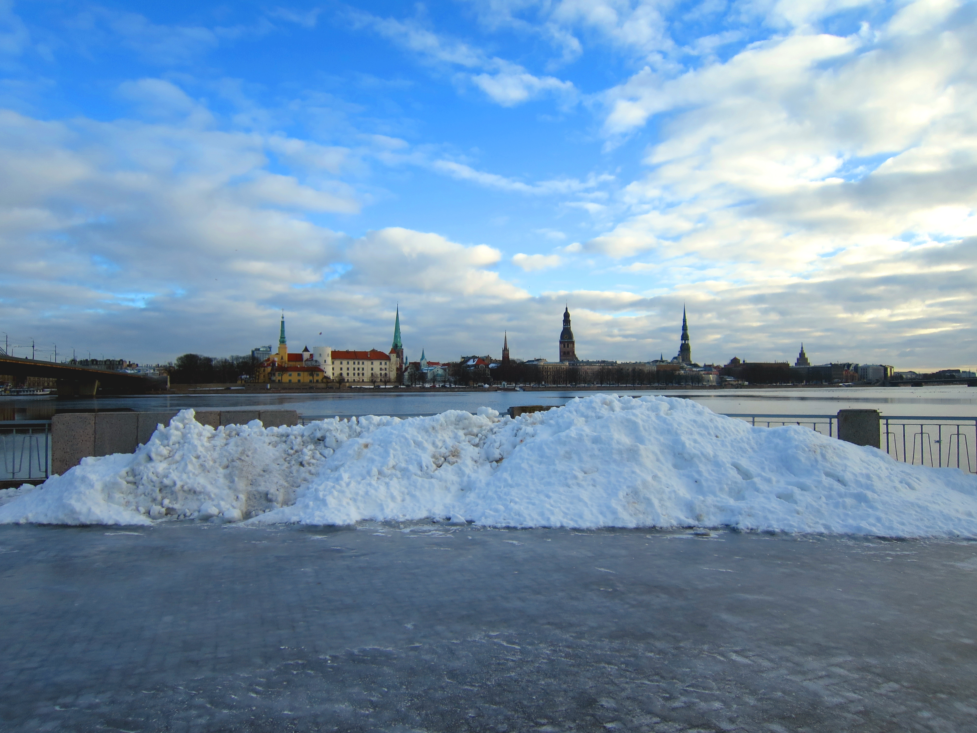 Rīga, ziemas diena